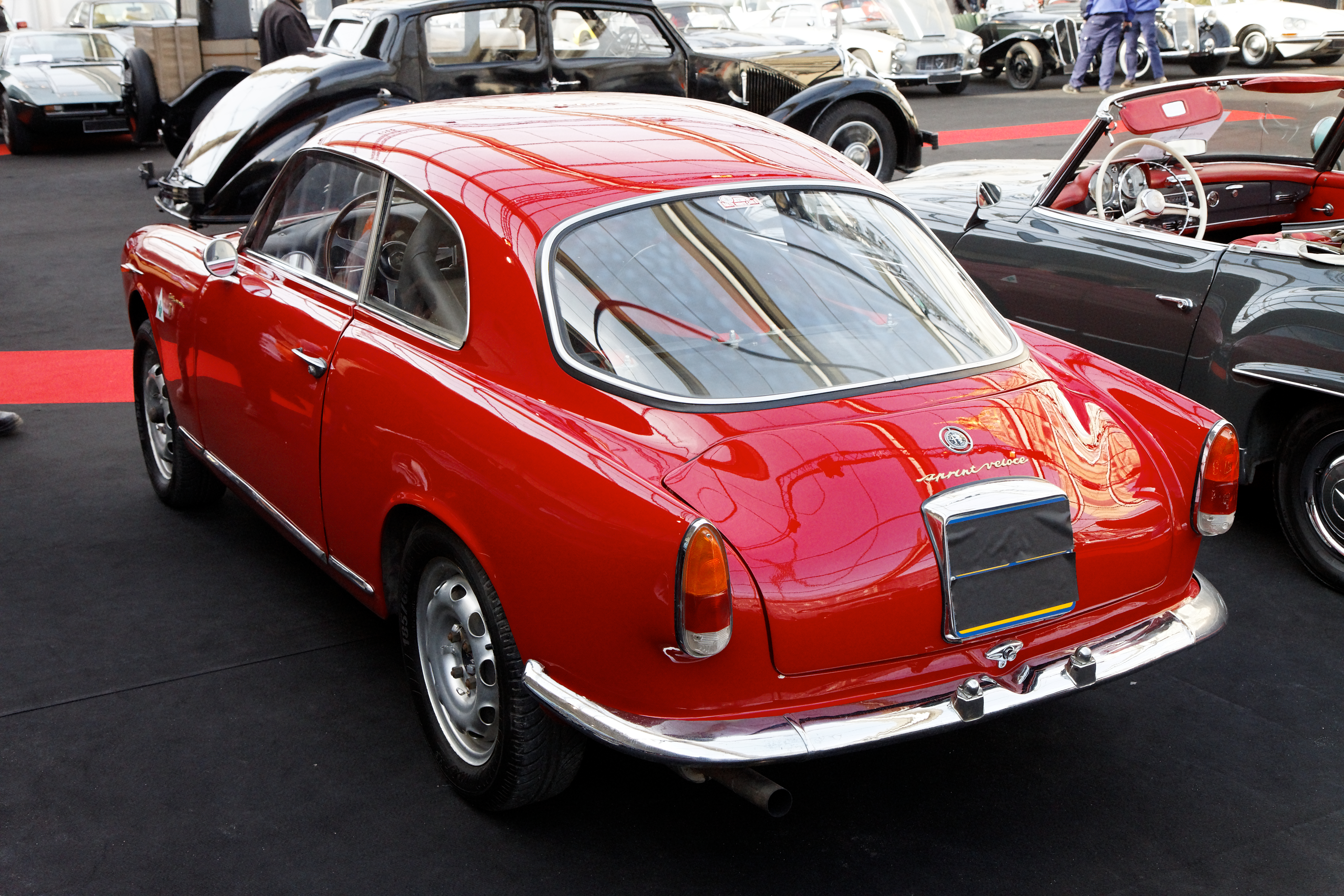 Alfa Romeo Giulietta Sprint Veloce - Festival Automobile International 2011 - Vente aux enchères